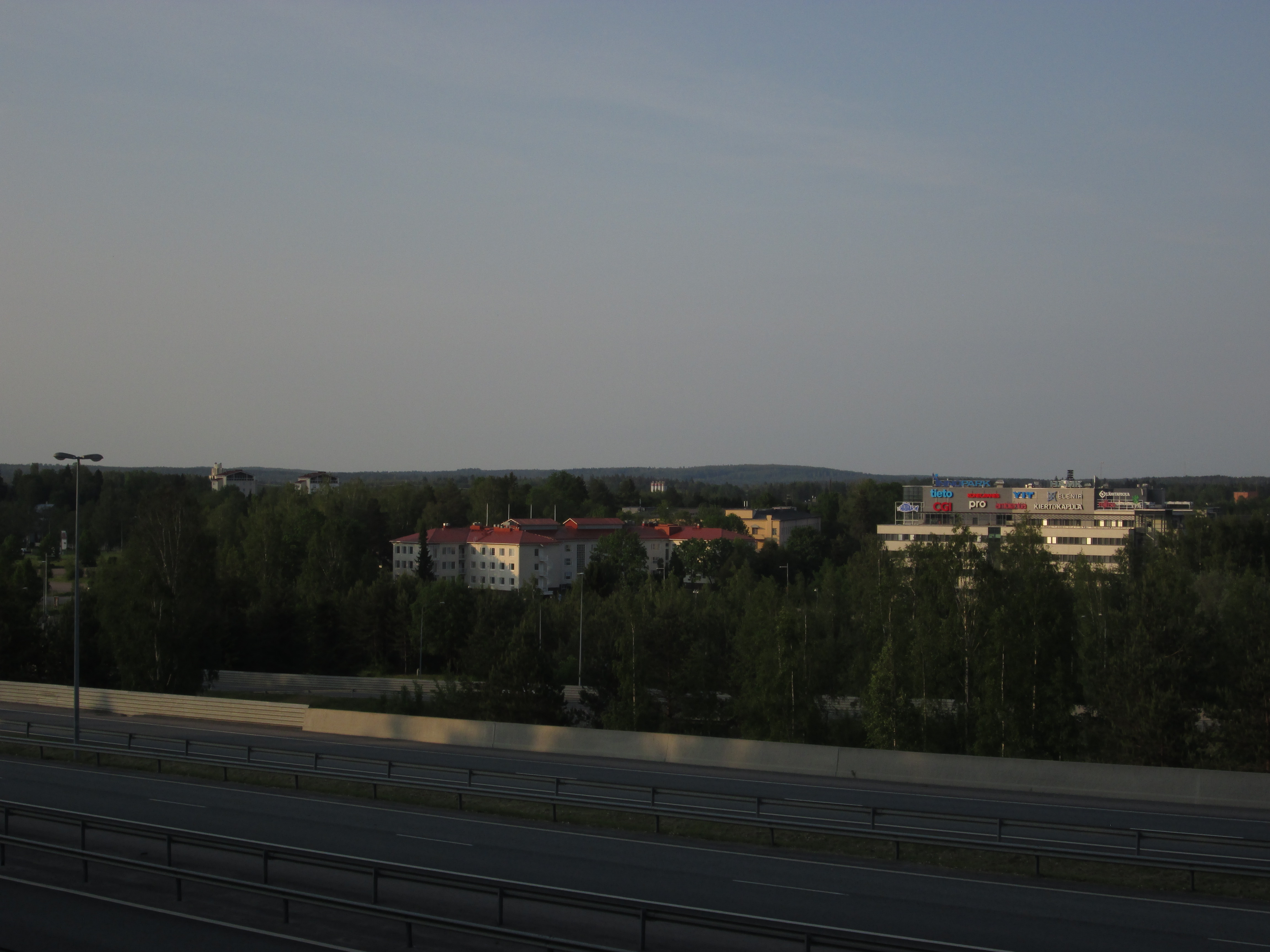 Visamäen aluetta nähtynä Hattelmalanharjun rinteeltä